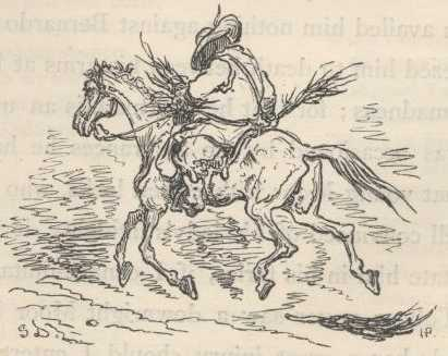 Ilustração de Gustave Doré para a edição de 1863 de "Dom Quixote" de Miguel de Cervantes